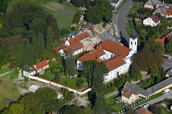 Bakonybél, Szent Mauriciusz Monostor a levegőből